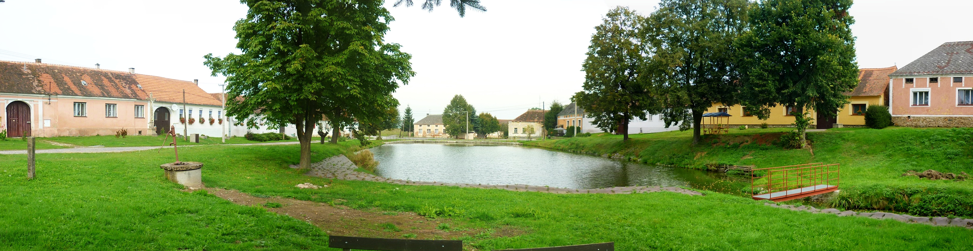 Hluboká - náves s rybníčkem